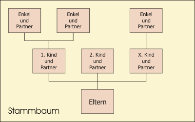 Familienstammbaum, selbstgezeichnet, GNU Freie Dokumentationslizenz